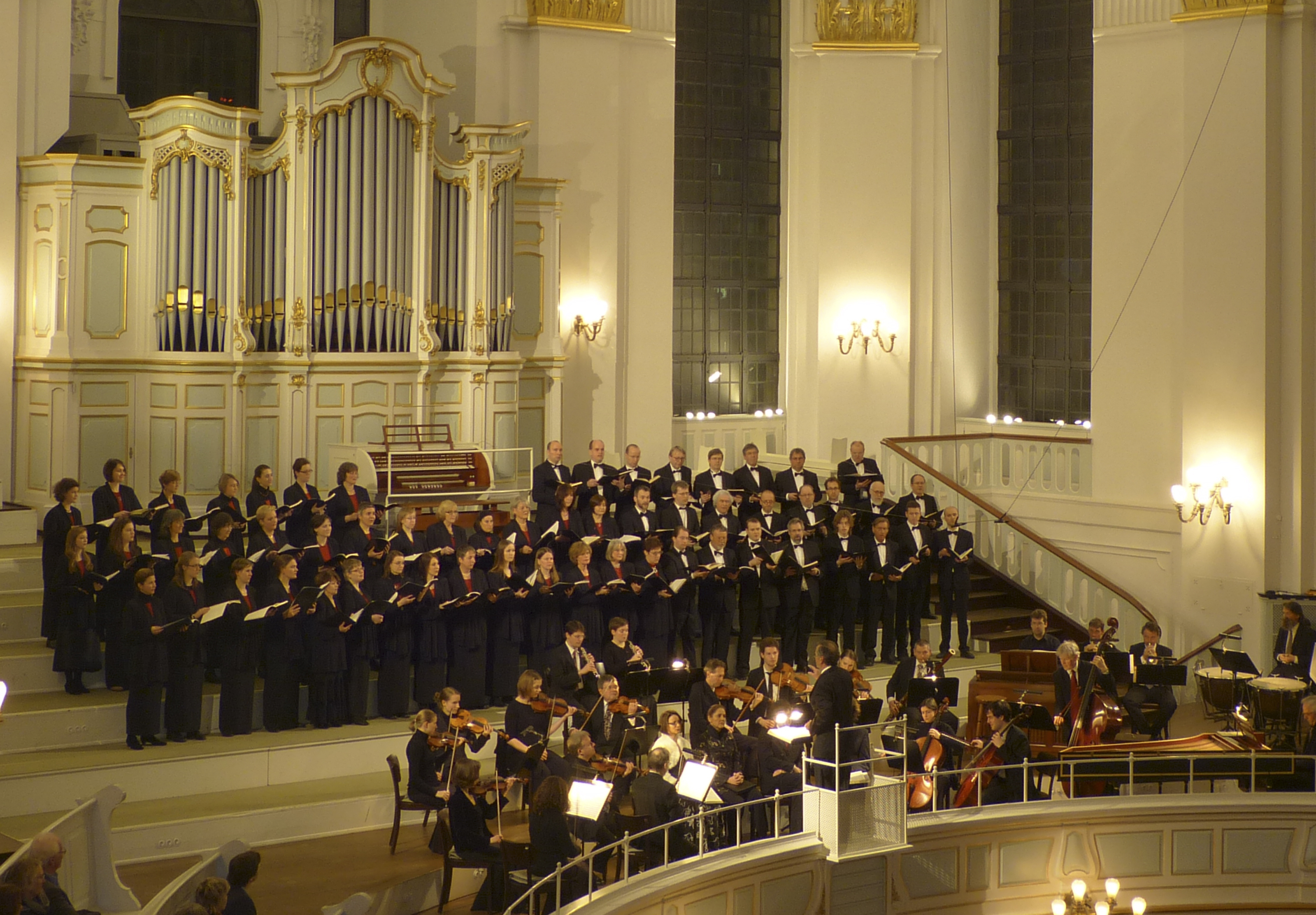 Der Monteverdi-Chor Hamburg im Februar 2012 in St. Michaelis, Hamburg